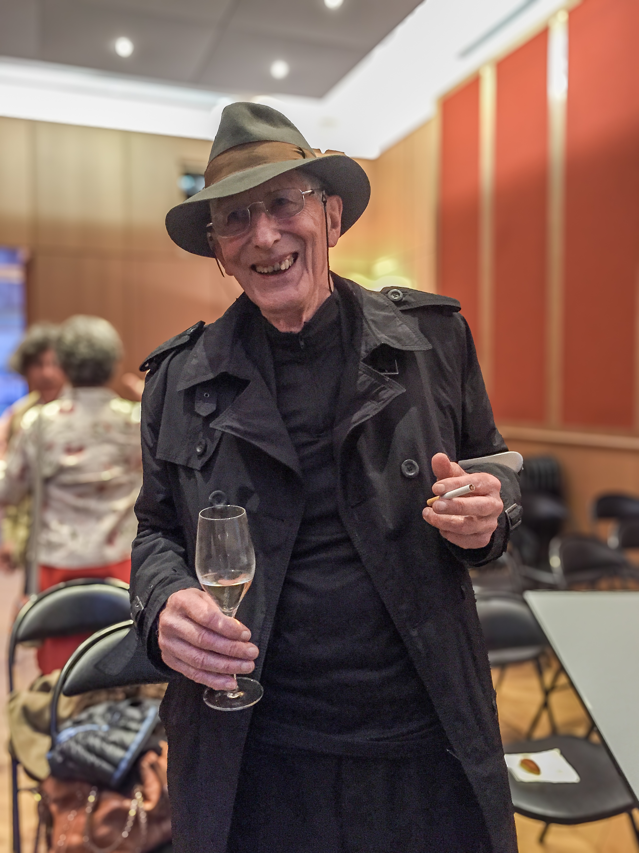 Remise des insignes de la Légion d'honneur à Jean Delas, cofondateur de L'école des loisirs – Tomi Ungerer